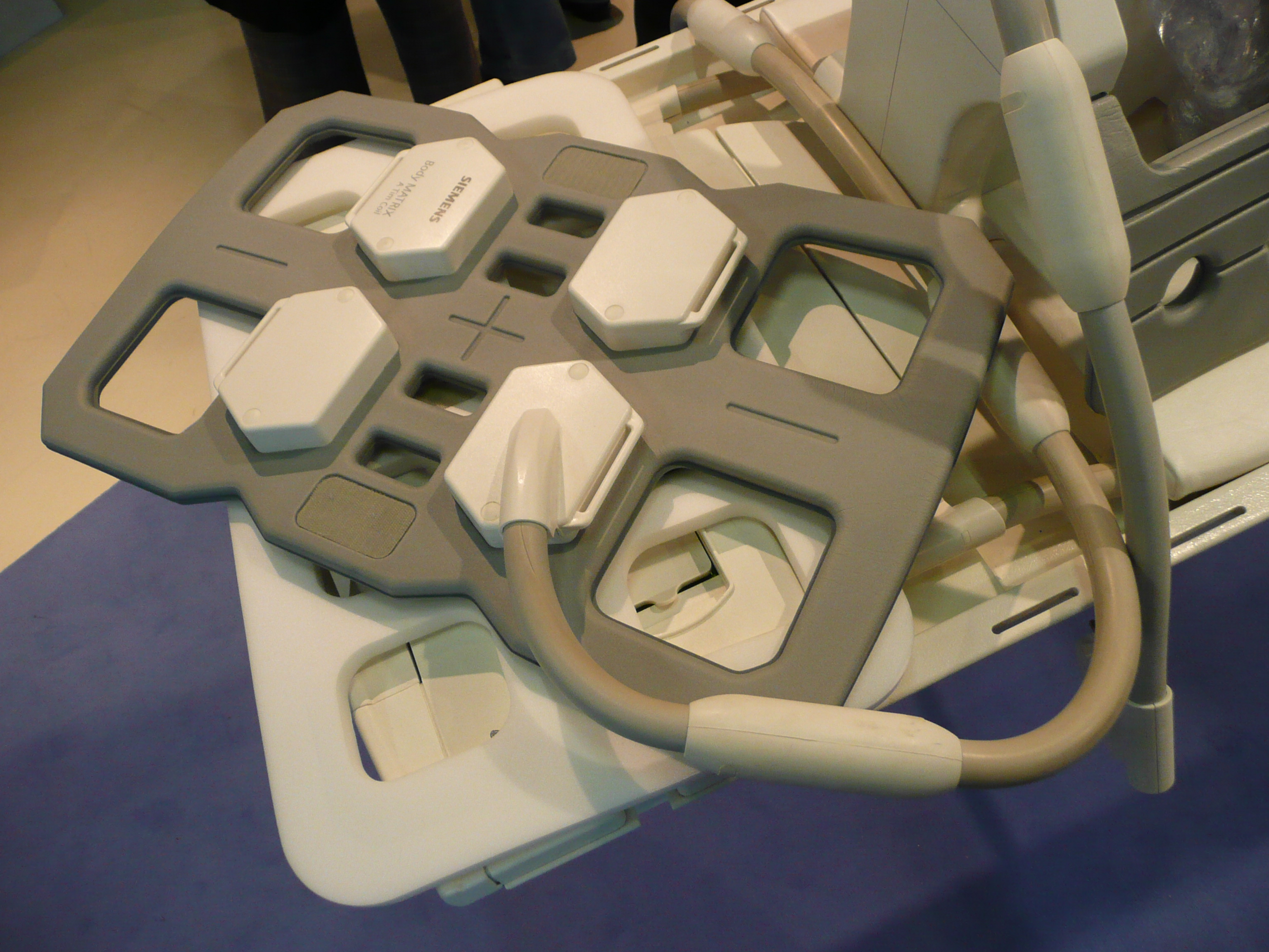 Antenne surfacique de marque Siemens destinée à l'imagerie par résonance magnétique.